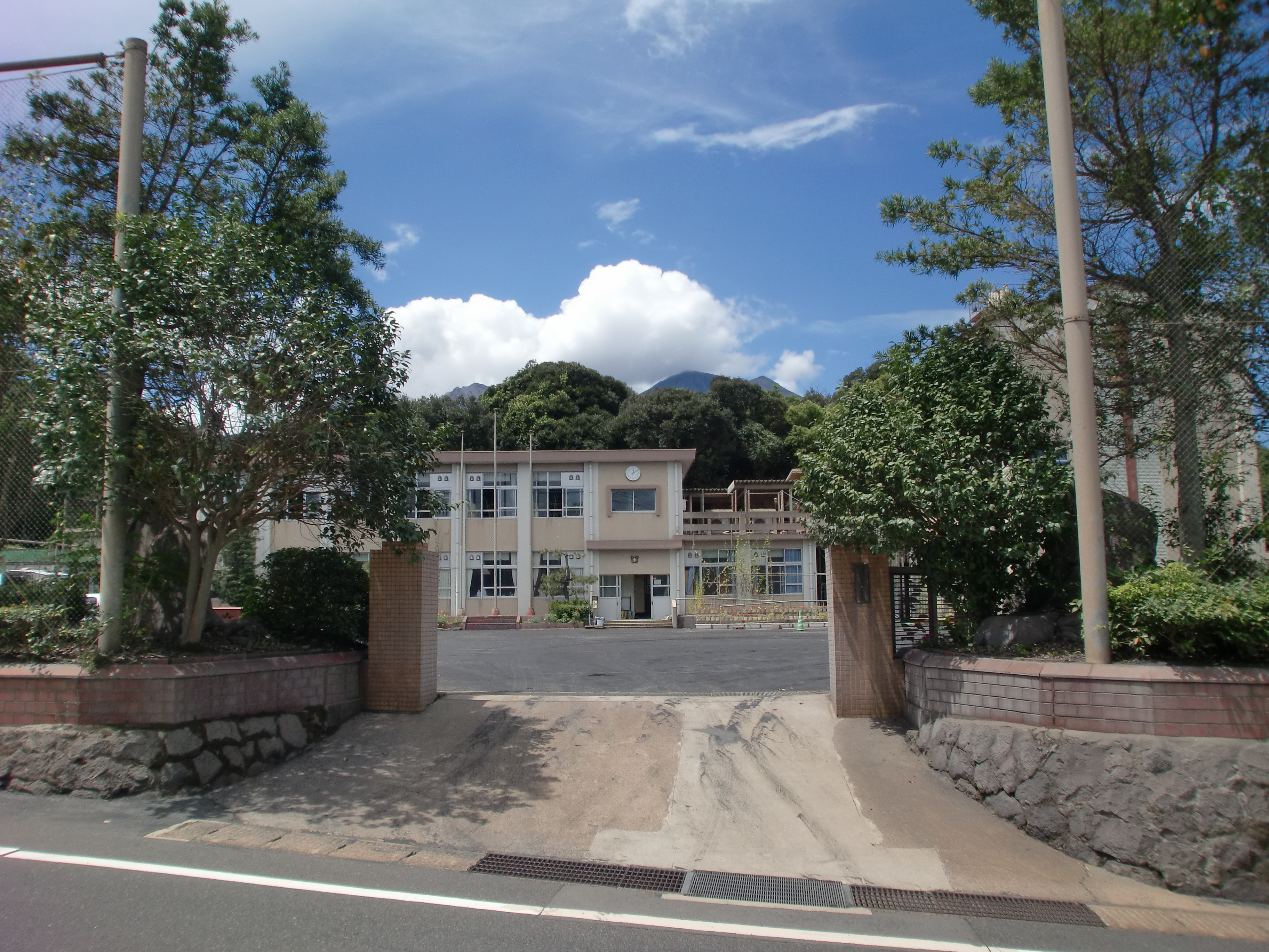 鹿児島市立黒神中学校の外観。